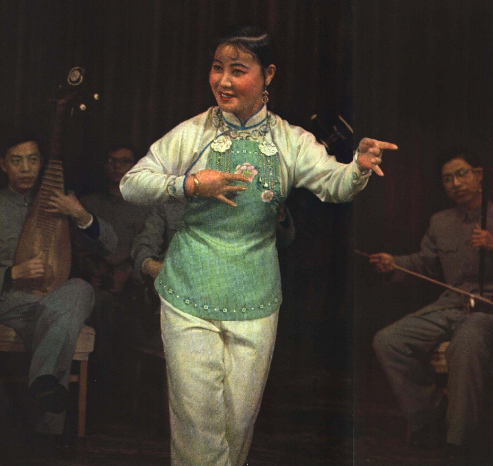 1964-02 1964年 郭兰英